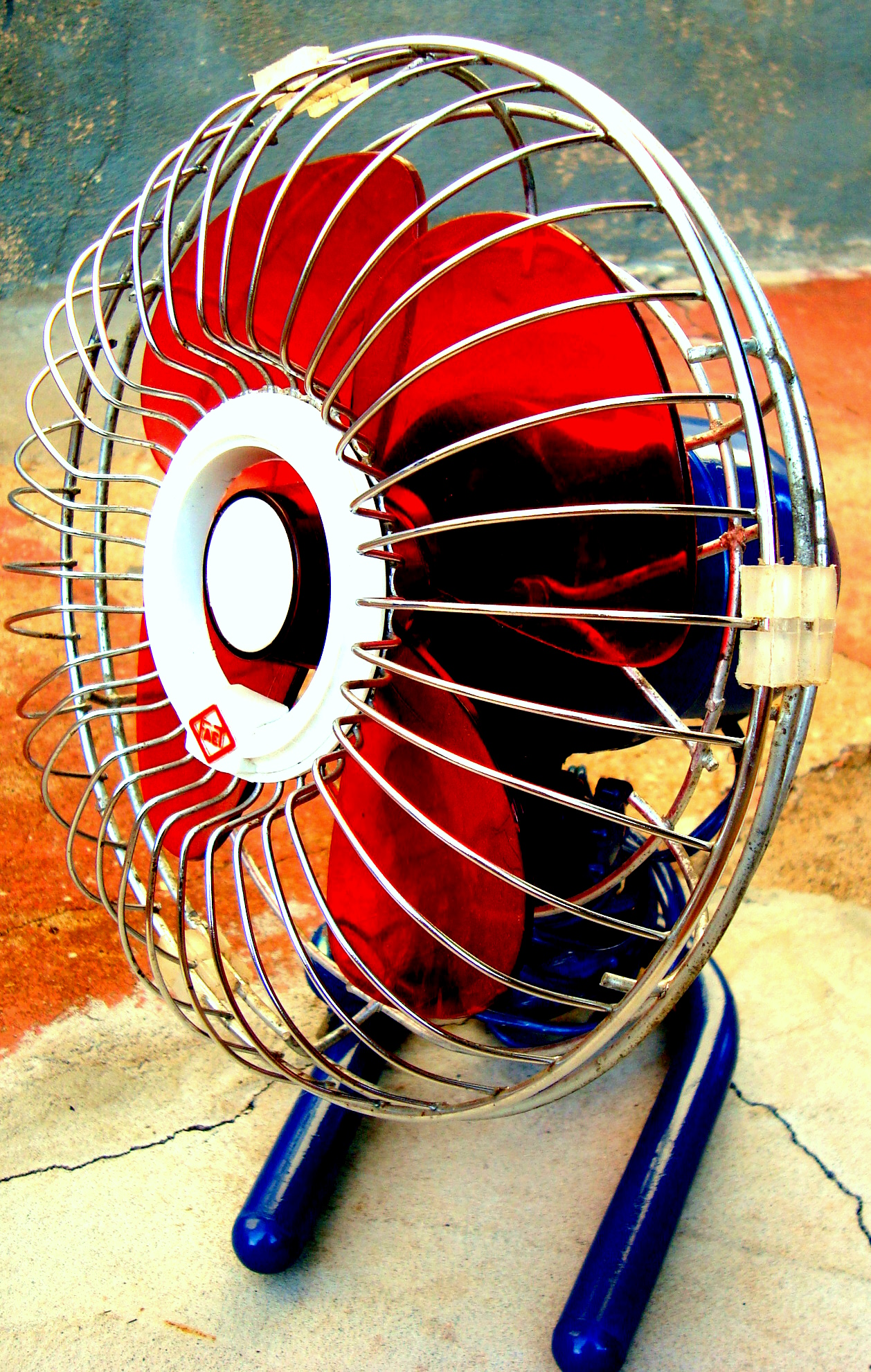 Ventilador Faet